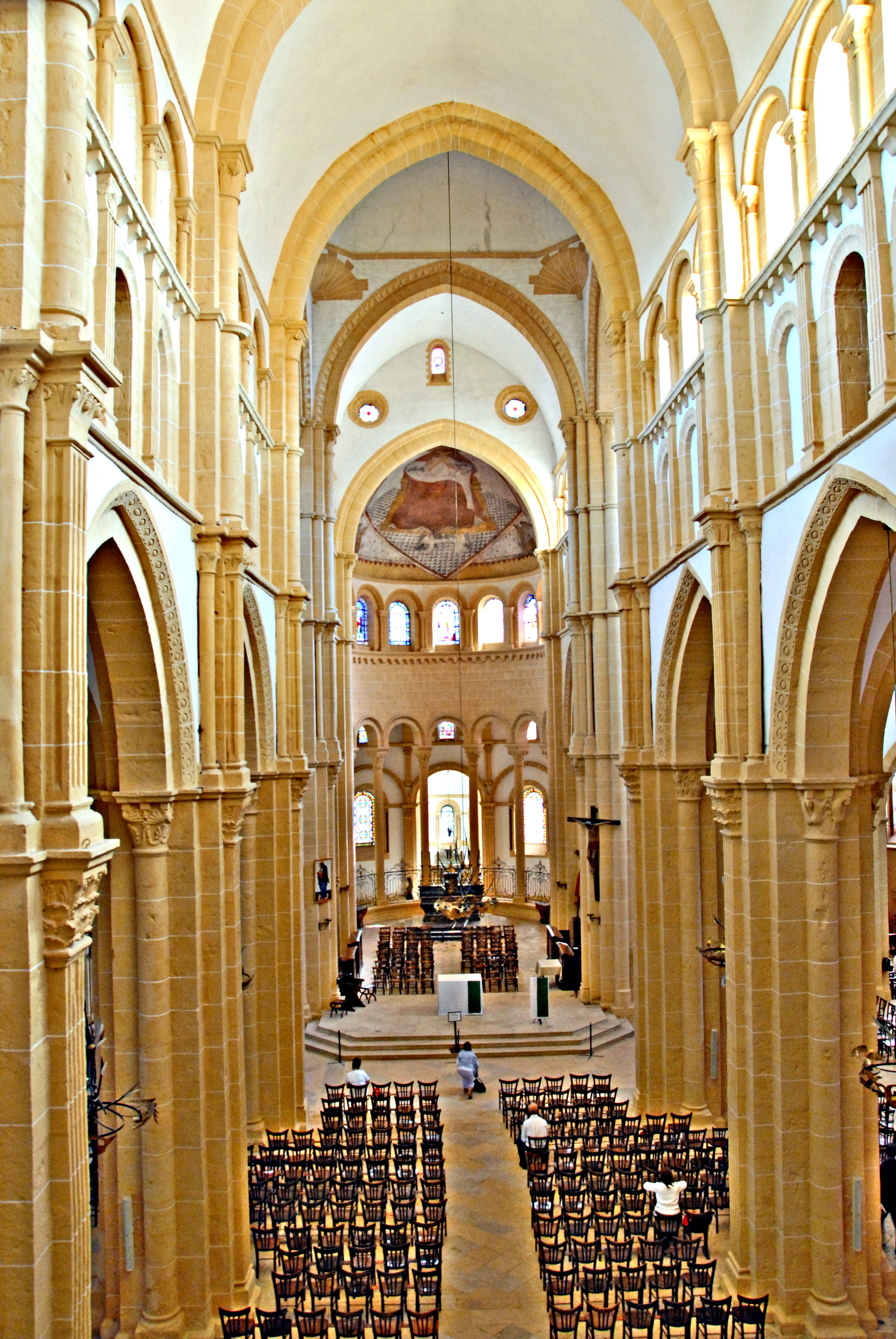 Mittelschiff z, Chor aus OG Narthex